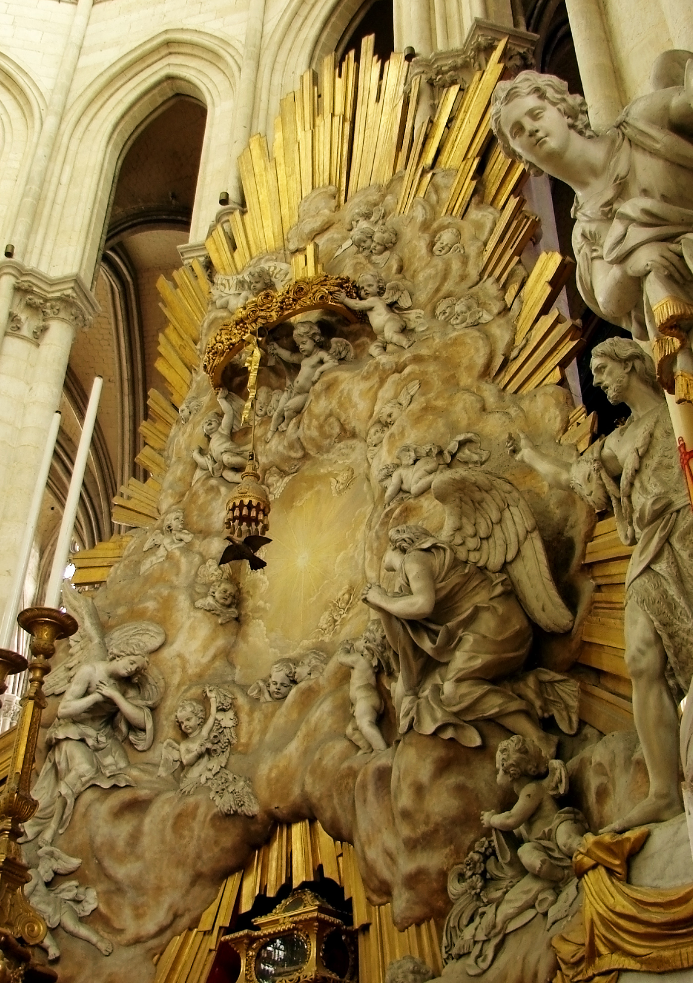 Le choeur baroque de la cathédrale d'Amiens a été dessiné par Pierre-Joseph Christophle (1715-1781) et exécuté par Jean-Baptiste Dupuis (1698-1790).Ici, vue latérale de la Gloire Eucharistique, au dessus du maître-autel.